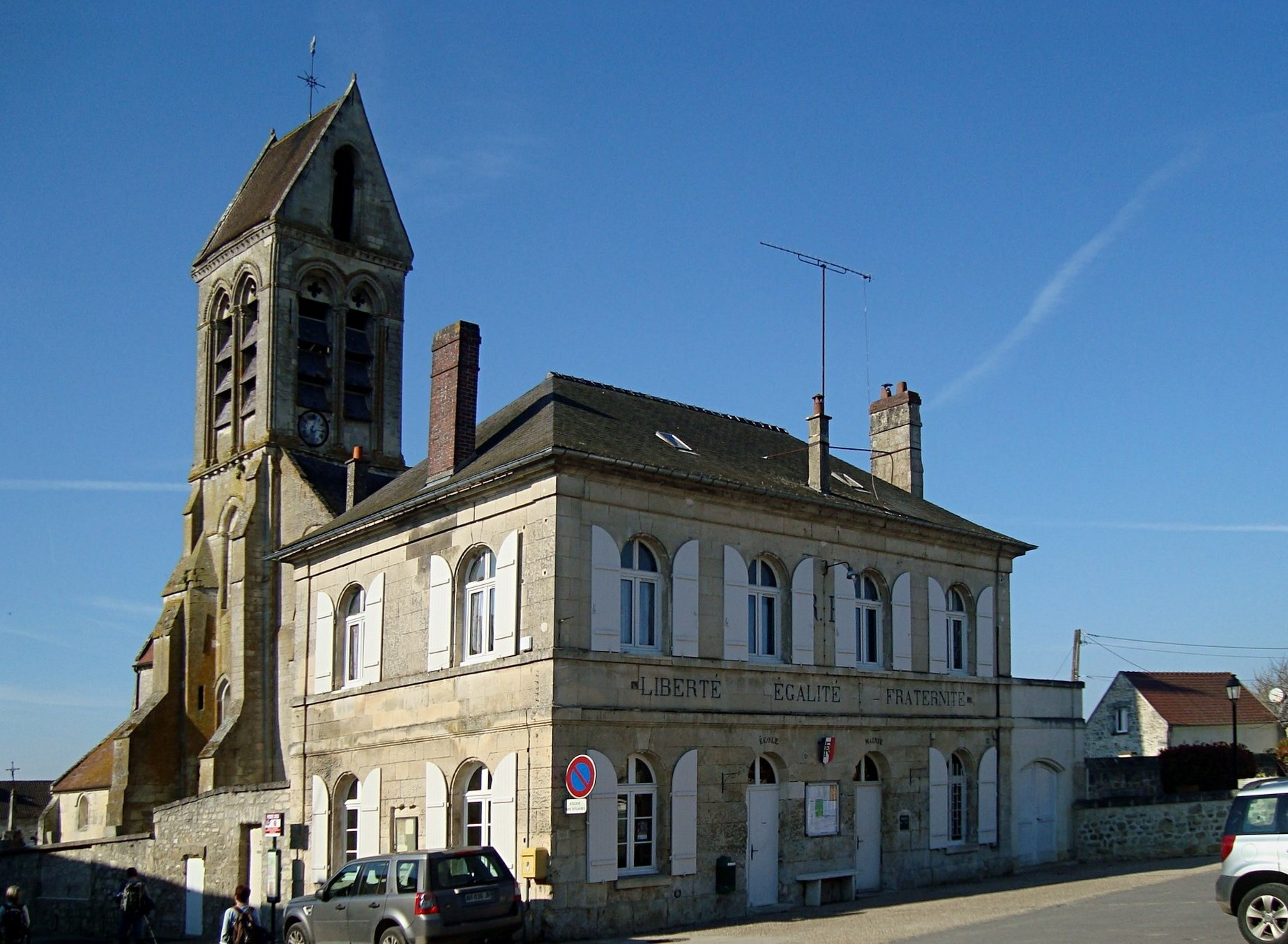 Mairie de Largny-sur-Automne, Aisne, France